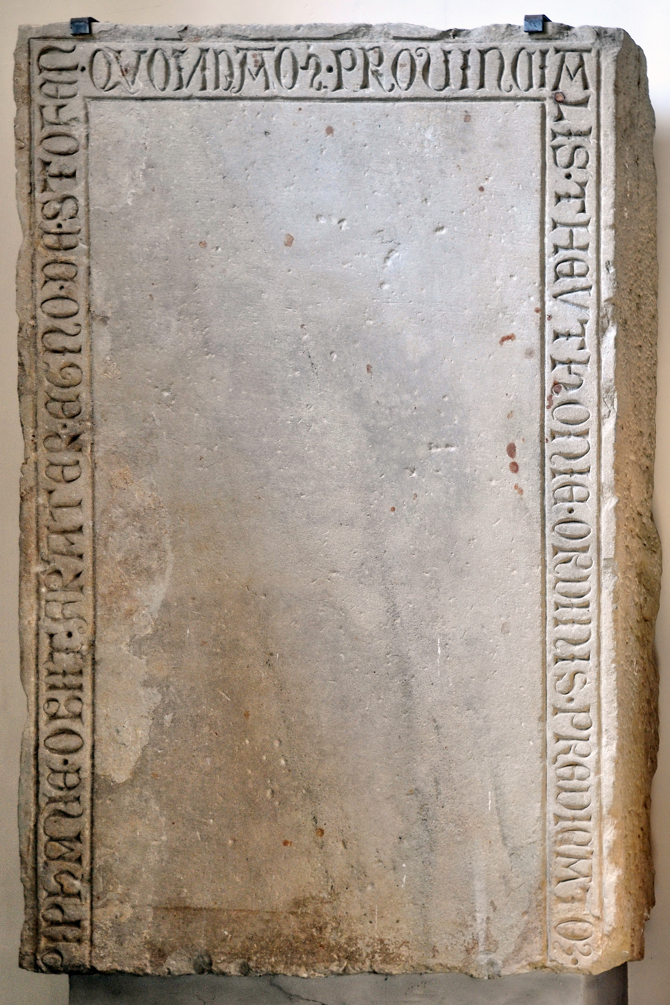 Predigerkirche in Zürich (Switzerland)